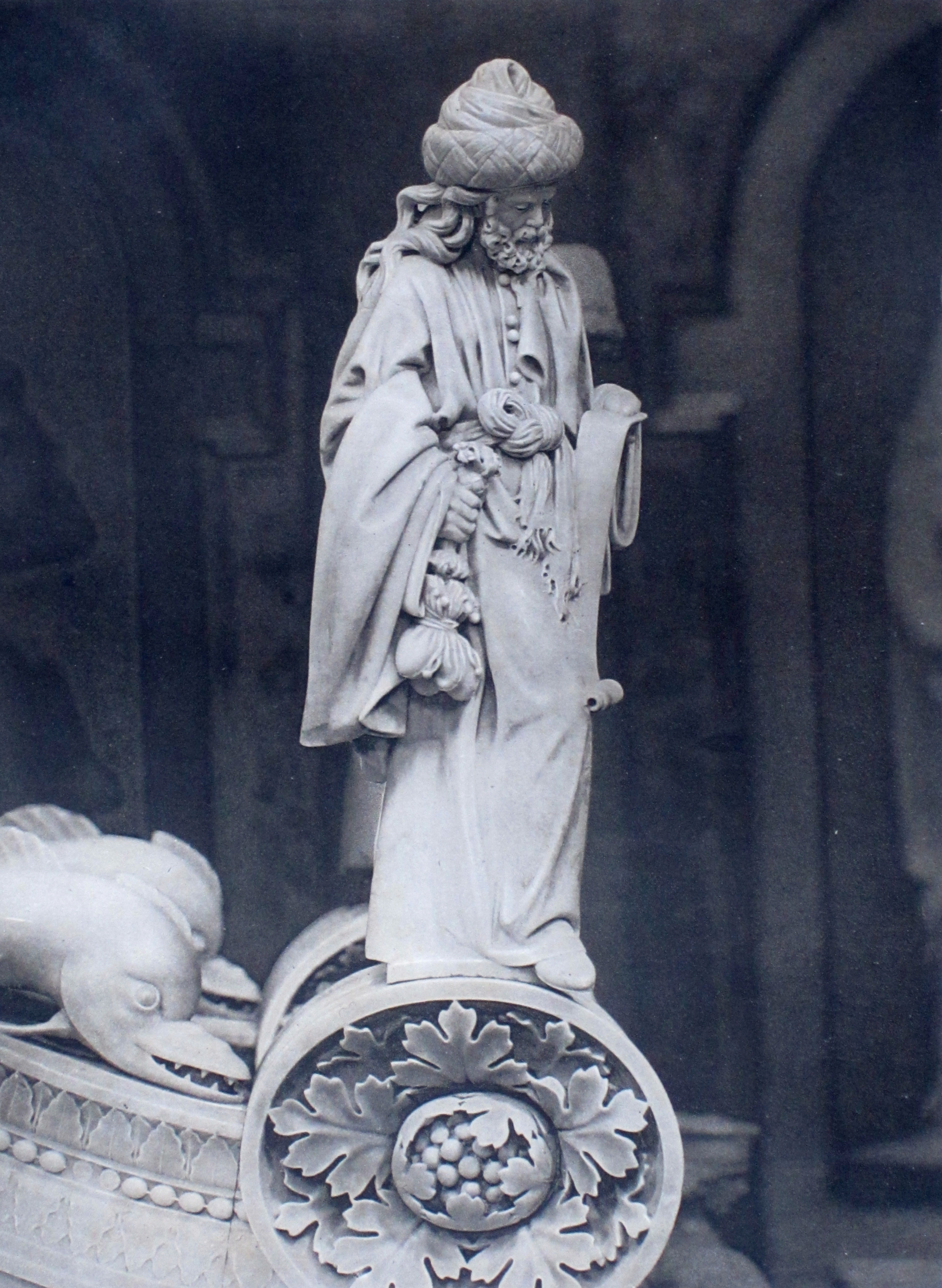 Saint Matthieu